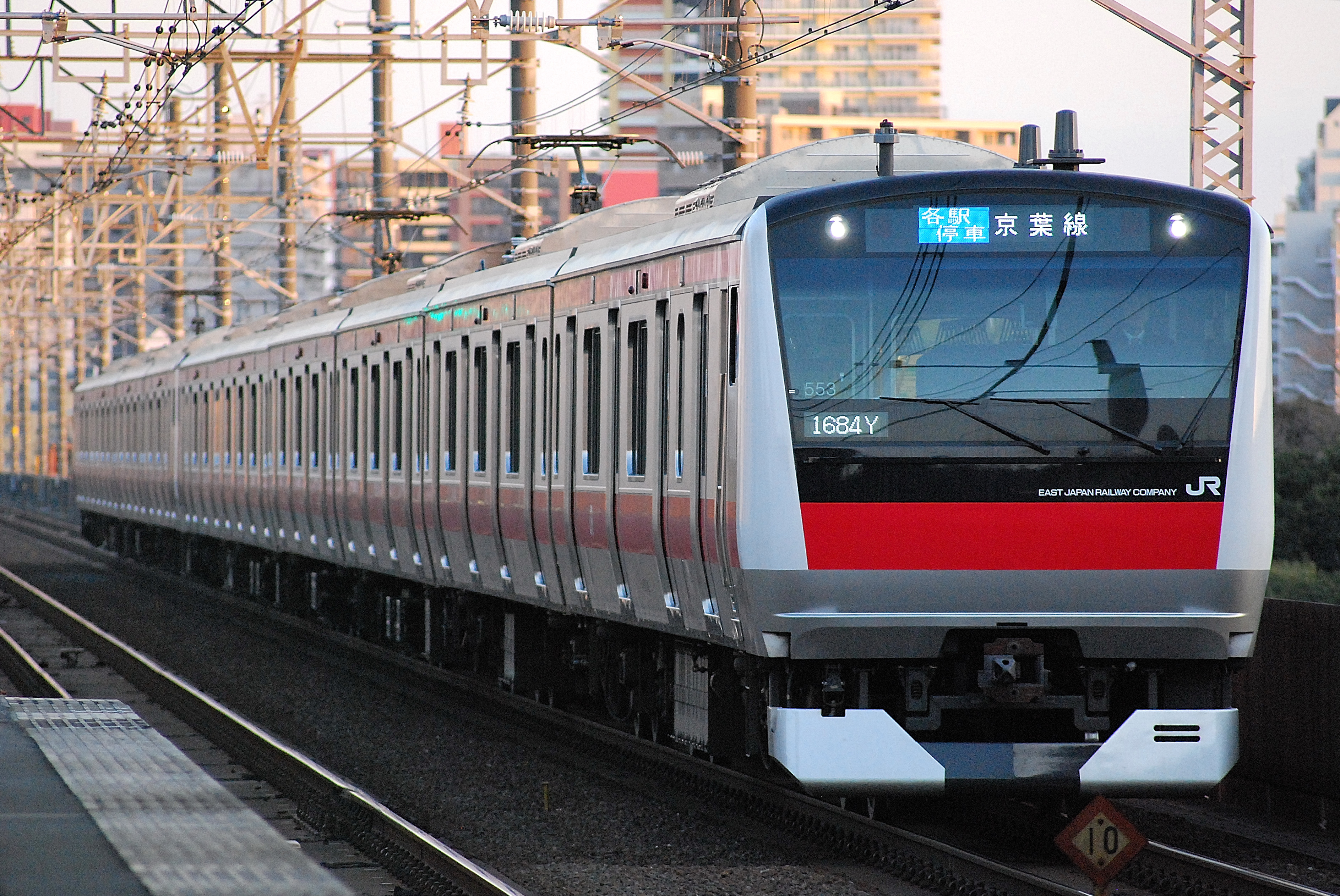 京葉線、京葉車両センター所属のE233系5000番台、6両＋4両分割編成。 （検見川浜駅）